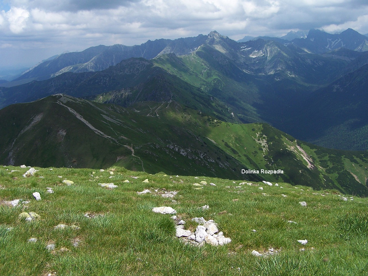 Kopa Kondracka, Dolinka Rozpadła, Dolina Cicha, Tatry Wysokie. Widok z Małołączniaka